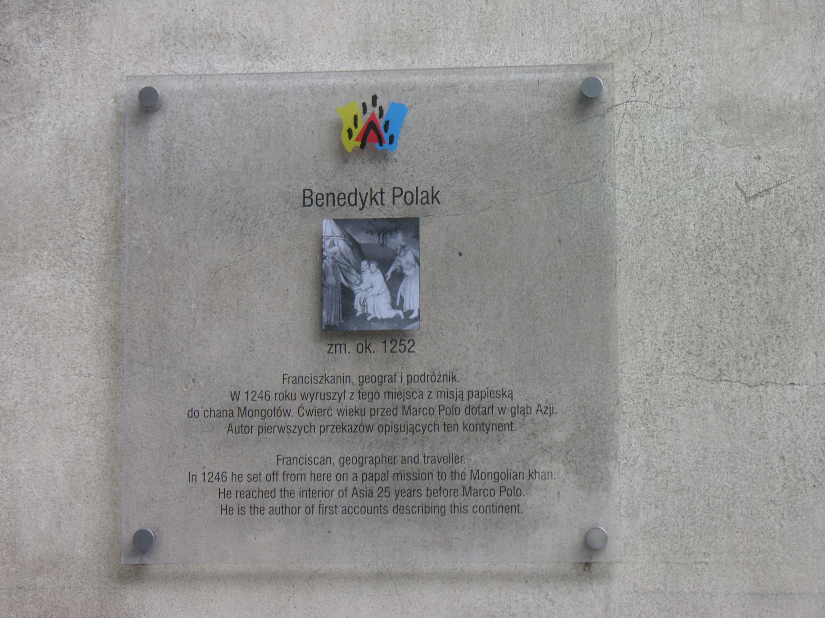 Tablica ku czci Benedykta Polaka na kościele św. Wincentego we Wrocławiu